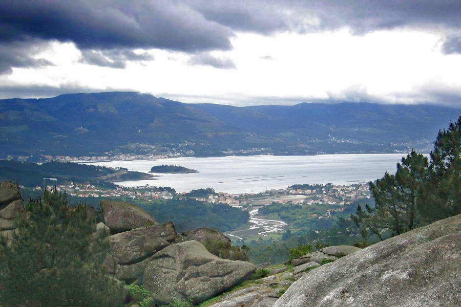 Santa Mariña de Esteiro é unha parroquia que se localiza no leste do concello de Muros, Galicia Publish by= User:Lmbuga.